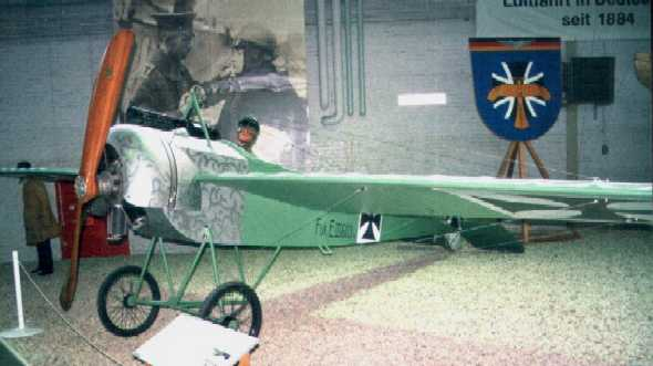 Fokker E-III (Nachbau) im Luftwaffenmuseum Berlin-Gatow